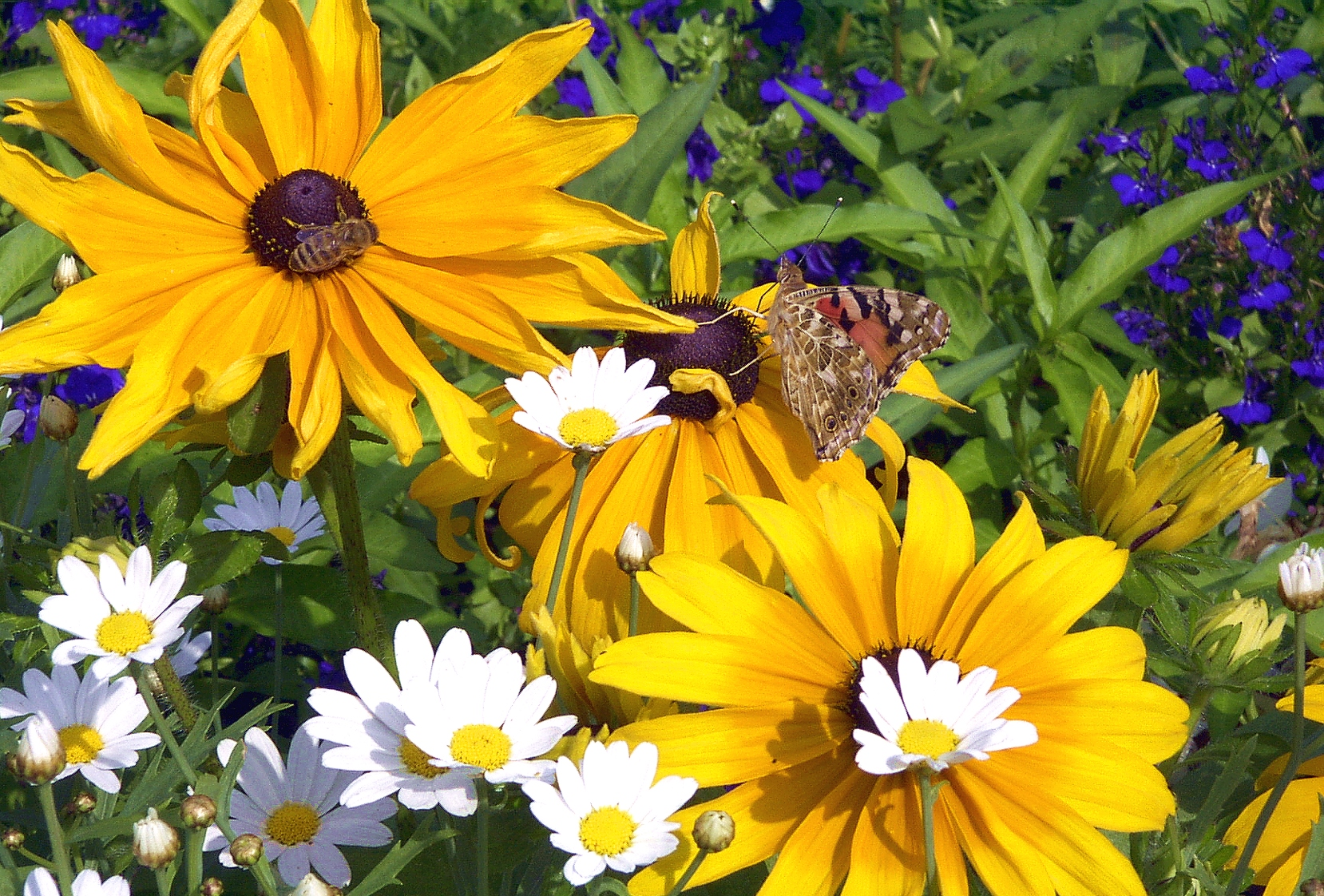 Blumen (Rudbeckia hirta) mit Distelfalter (Vanessa cardui) und Biene